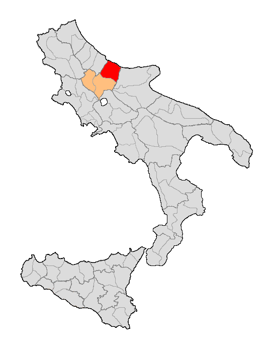 Locator map of Distretto di Larino